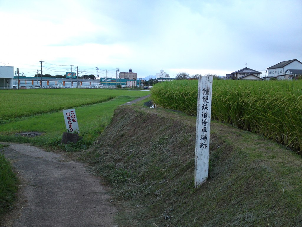 熊本軽便鉄道（大日本軌道熊本支社）が運営していた大津線の停車場跡標。